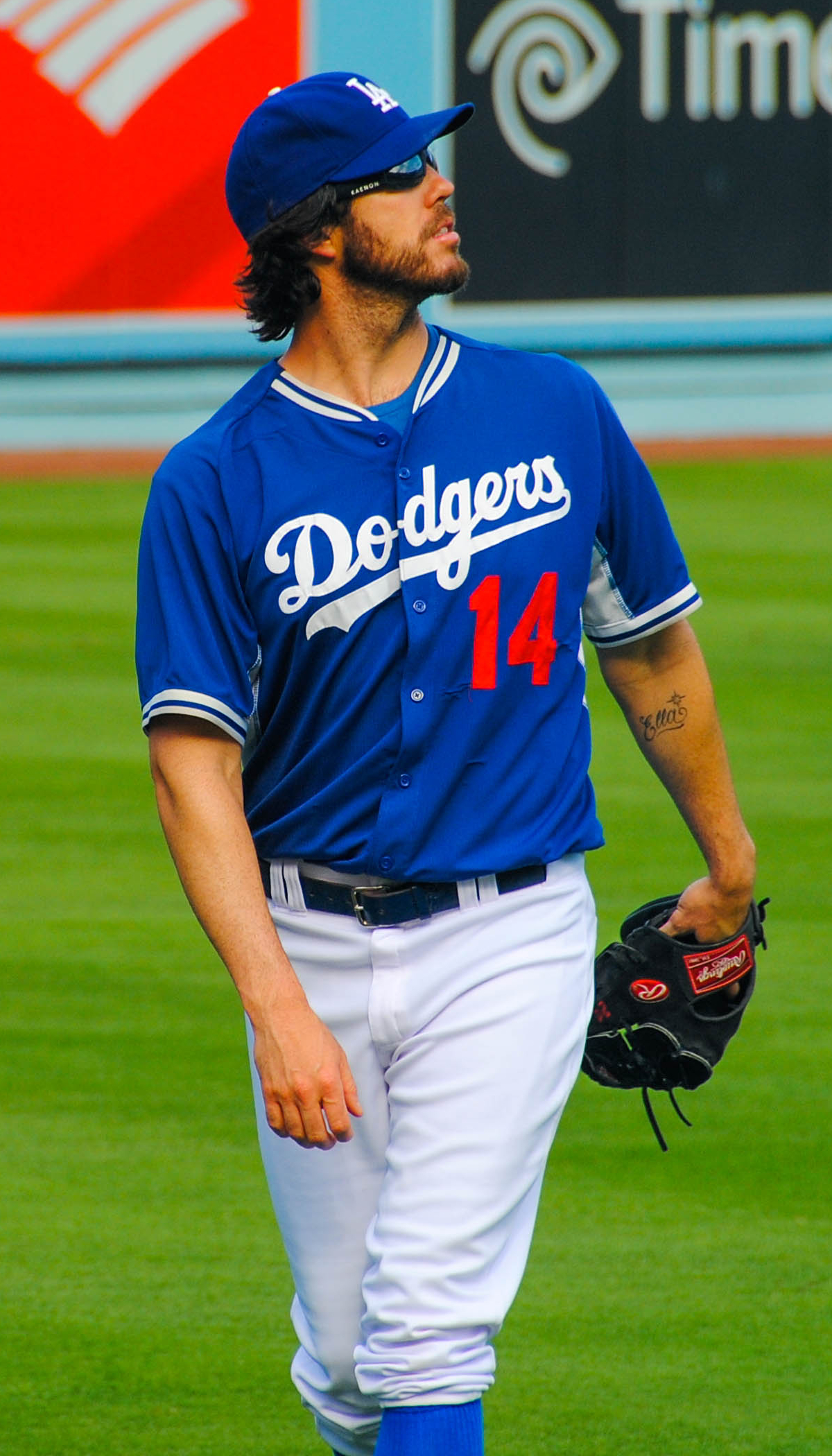 Dan Haren